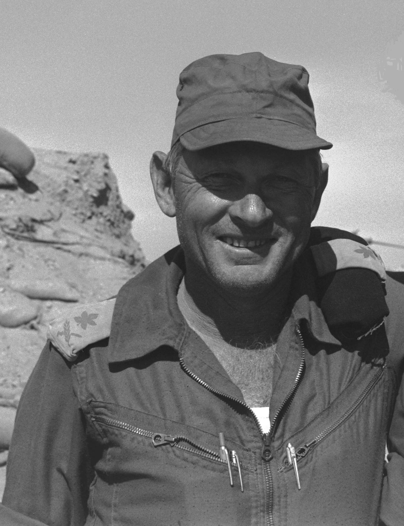 ALUF AVRAHAM ADAN, NEAR THE SUEZ CANAL, THE SOUTHERN COMMAND. אלוף אברהם אדן ליד תעלת סואץ Photo: RUBINGER DAVID.